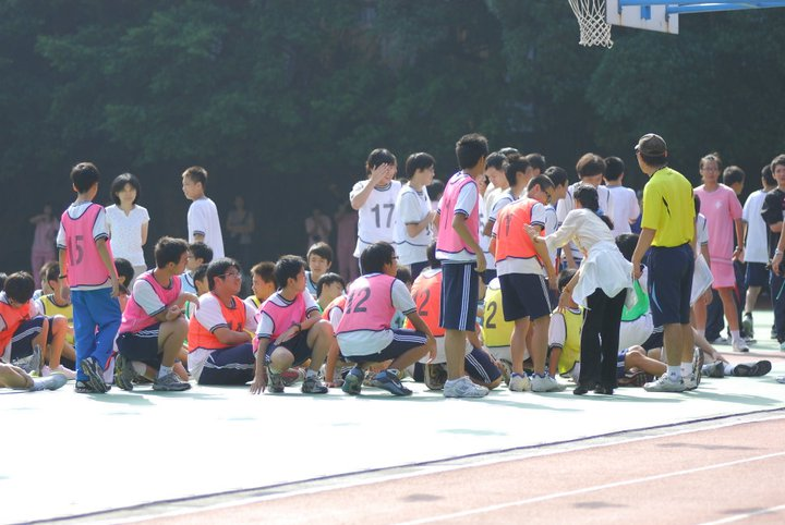 中文（台灣）: 臺北市立大安國民中學第48屆校慶班際接力賽跑。